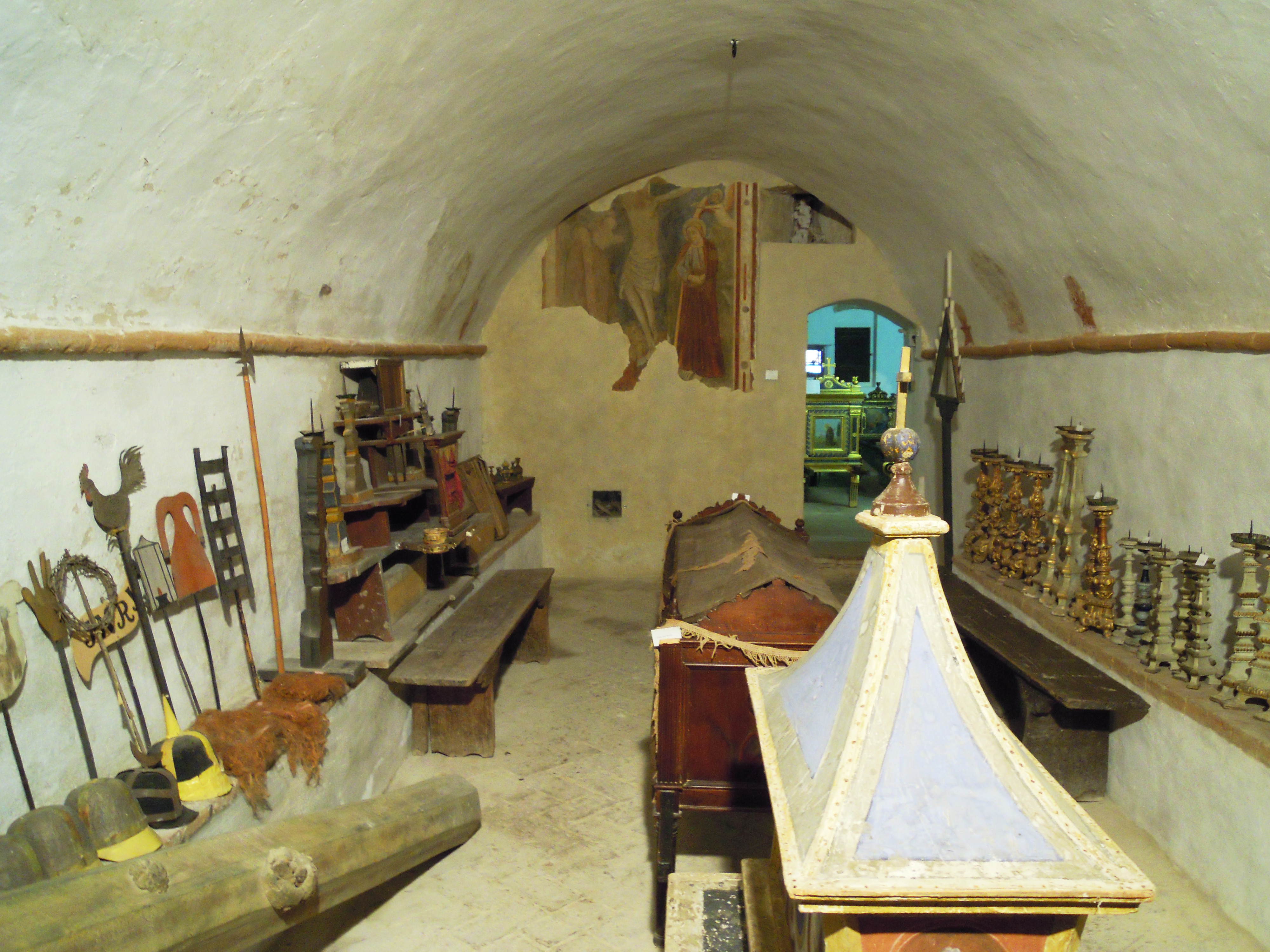 La cripta verso la parete di fondo.